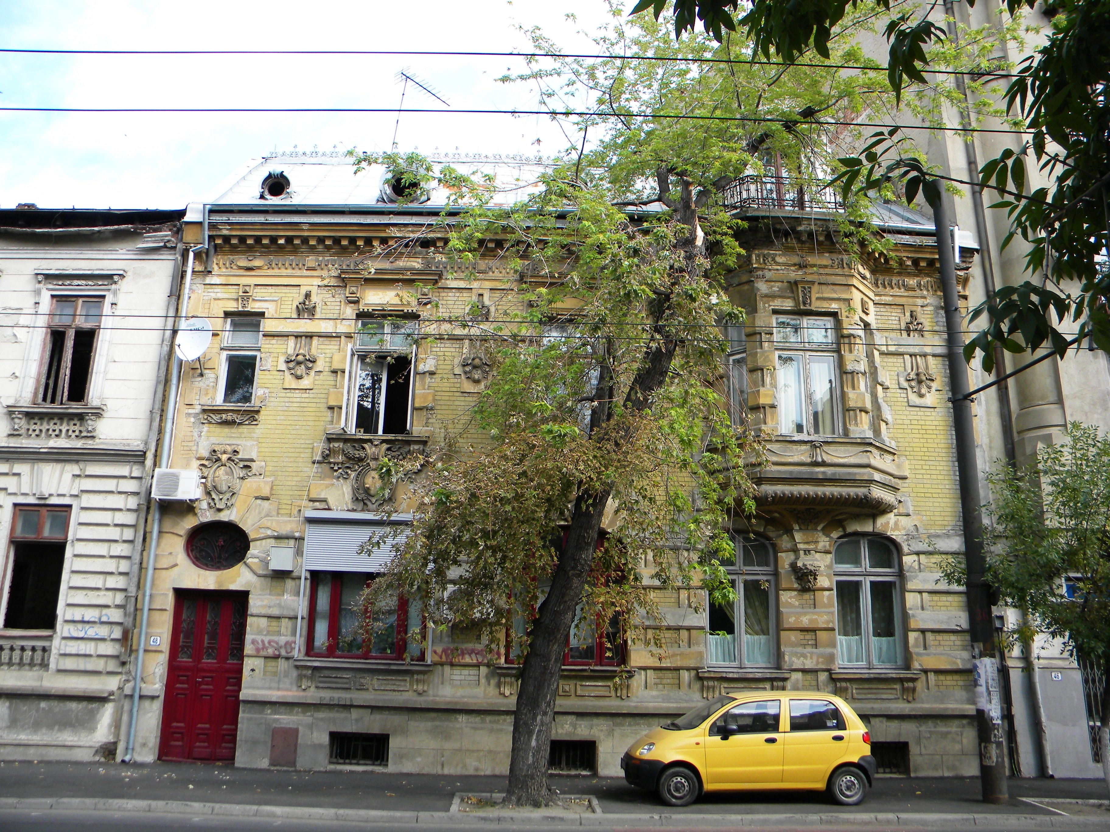 Bucuresti, Romania, Casa pe Calea Grivitei nr. 48 sect. 1 (Casa Elsner)